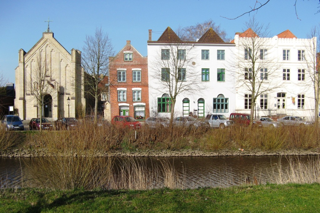 Fuenf-Giebel-Haus and St. Knud Church, Friedrichstadt, Germany